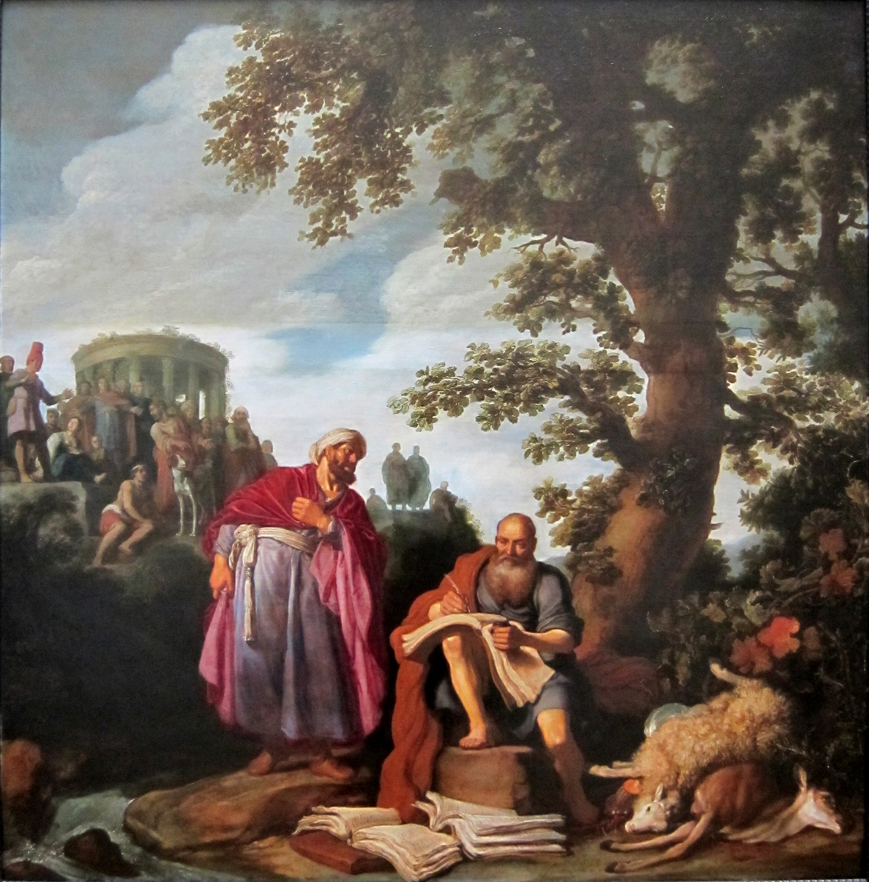 Hippocrate rendant visite à Démocrite